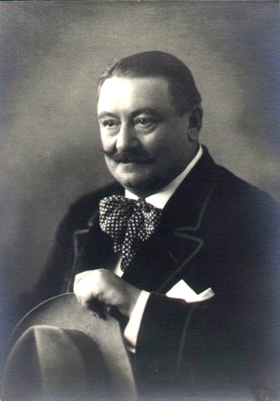 Fráter Loránd (Érsemjén, 1872. január 13. - Budapest, 1930. március 13.) dalszerző "Jó estét kívánok, Megjöttek a fehérvári huszárok. Jöttek, láttak, győztek, Sok kislányt megfőztek. Jó estét kívánok, Megjöttek a fehérvári huszárok"